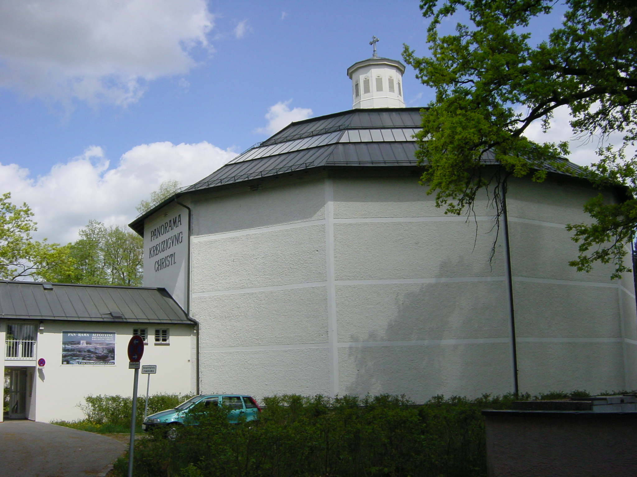 Altötting, Panorama Kreuzigung Christi, Außenansicht des Gebäudes